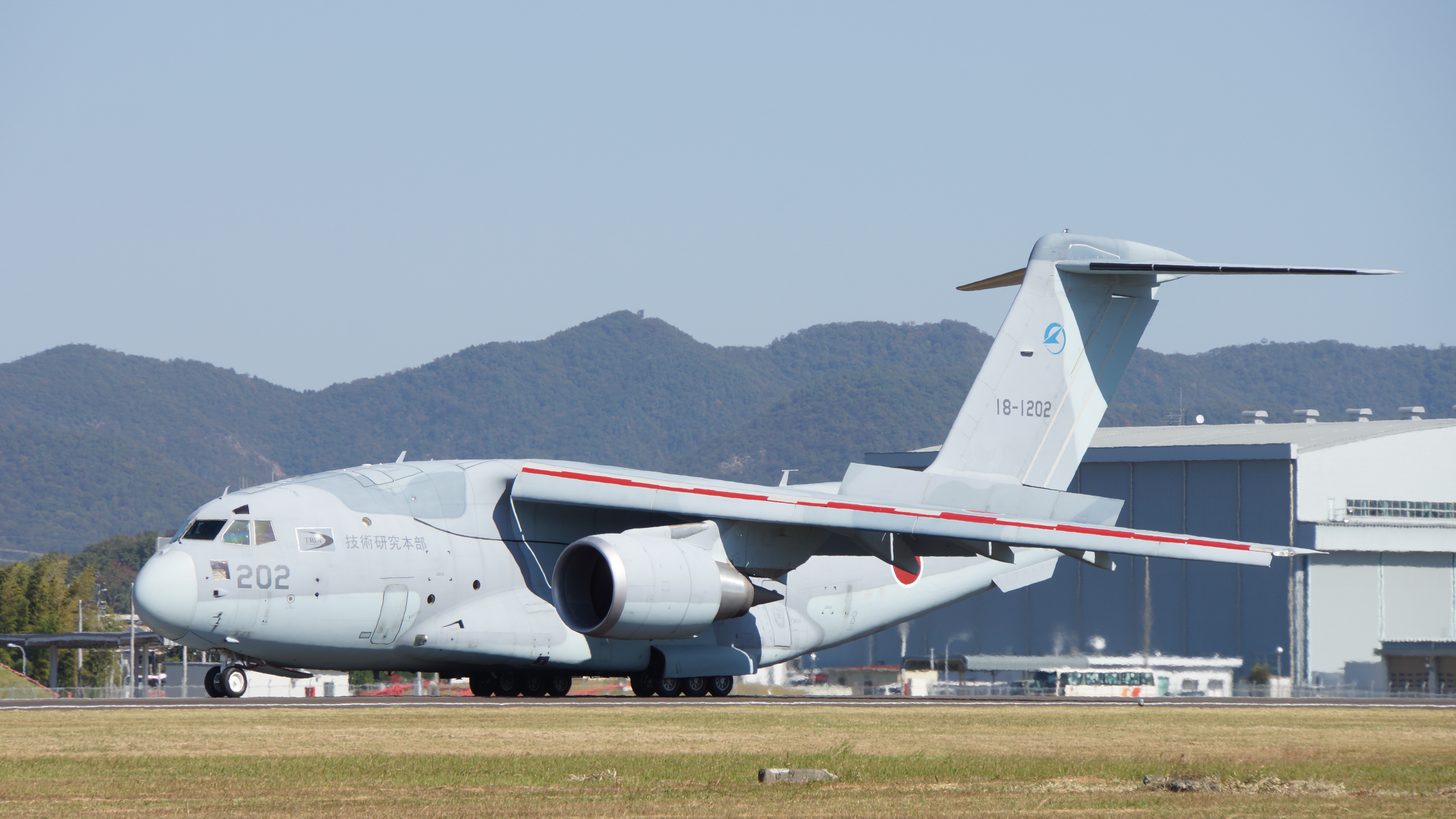 航空自衛隊 XC-2輸送機（18-1202号機）。 15年10月25日 岐阜基地にて。